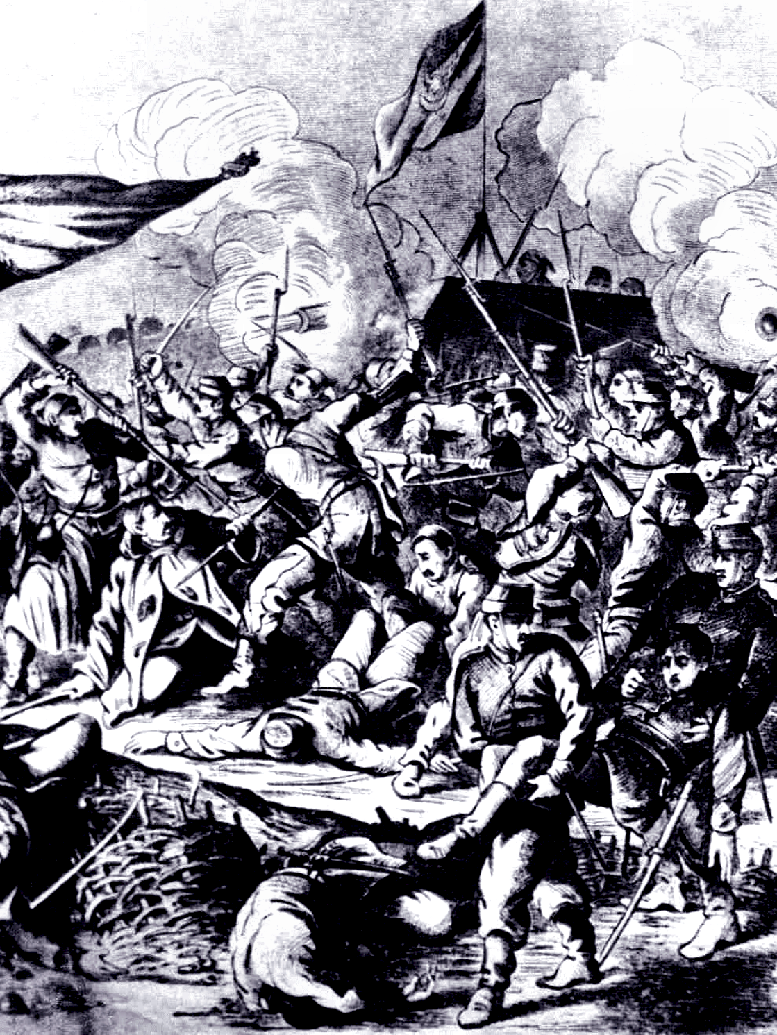 Asaltul trupelor române asupra redutei Bucova, din apropiere de Plevna 1877